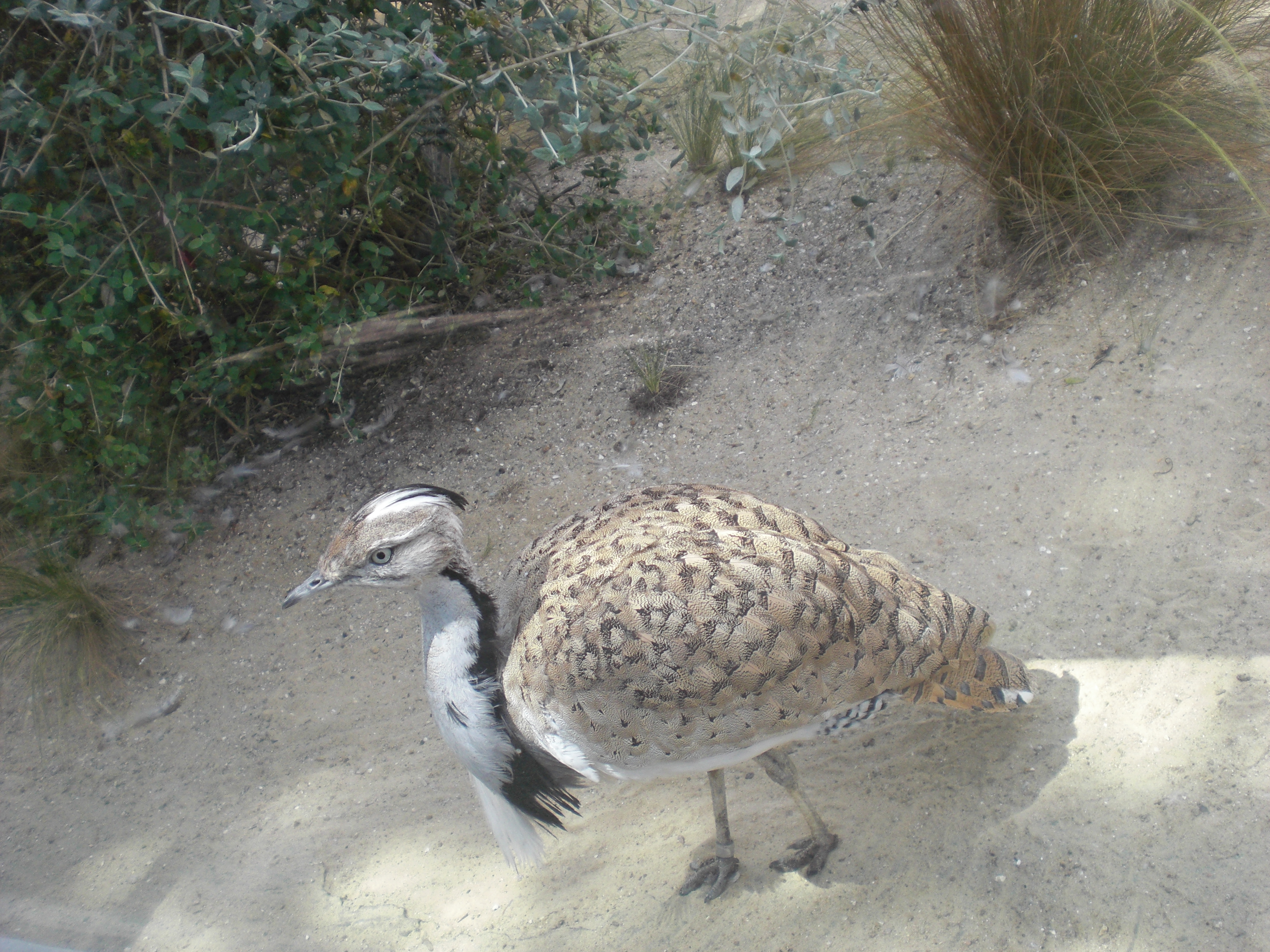 Makkvina otido